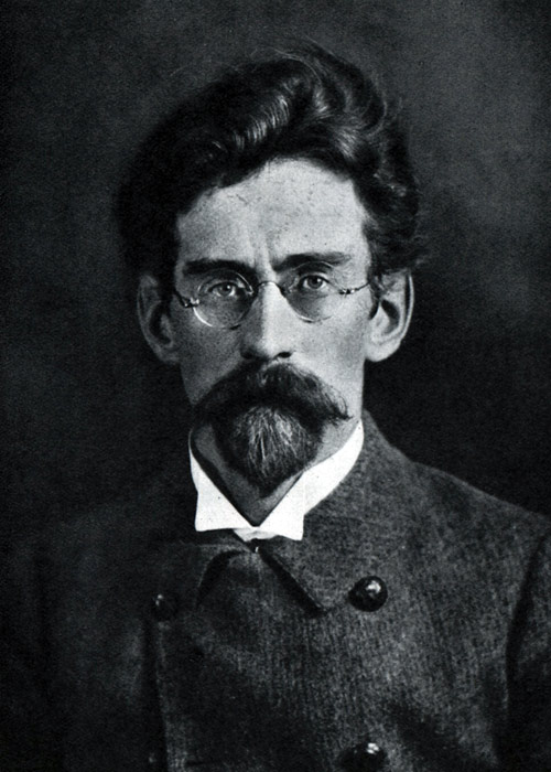 Martin Koch